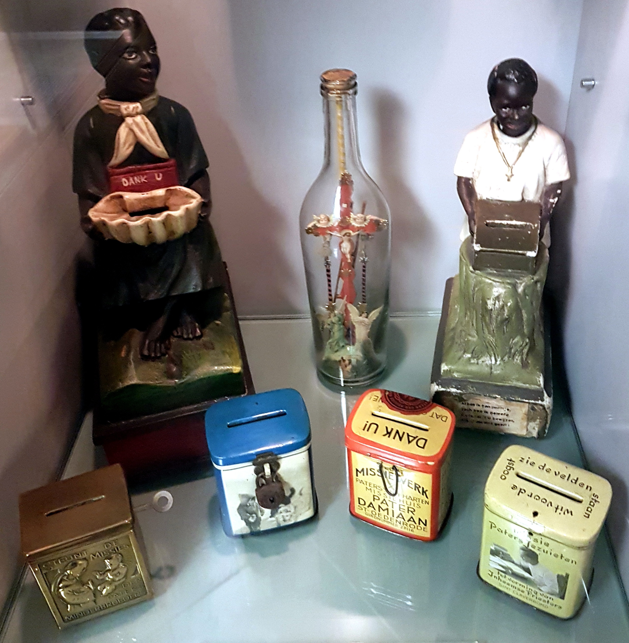 Missiebusjes in de schatkamer van de Onze-Lieve-Vrouwebasiliek in Maastricht.